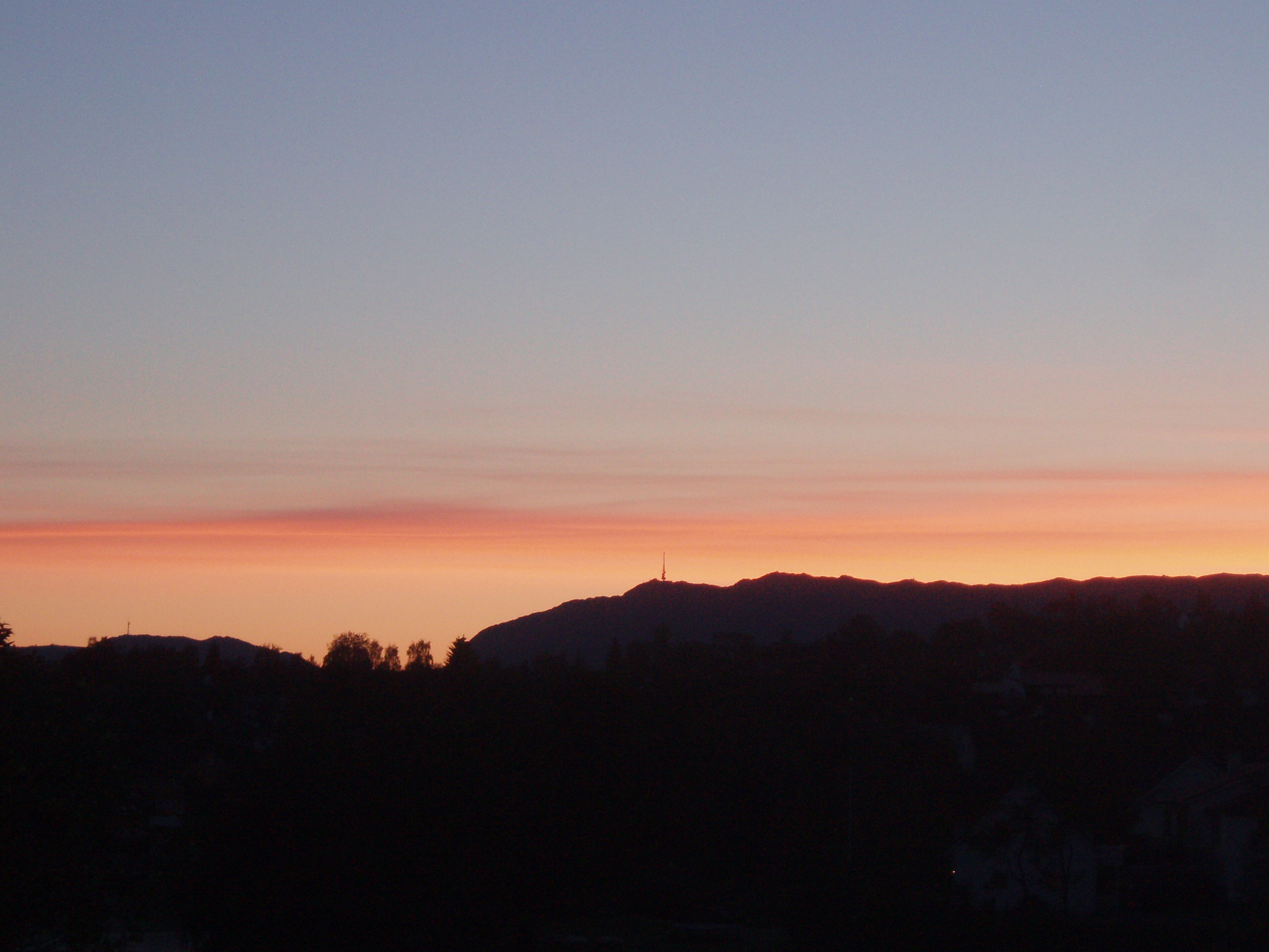 Ulriken at 04:34 am, seen from Fana near Lagunen.